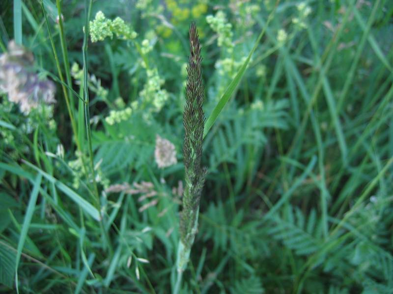 Sand-Reitgras Calamagrostis epigejos